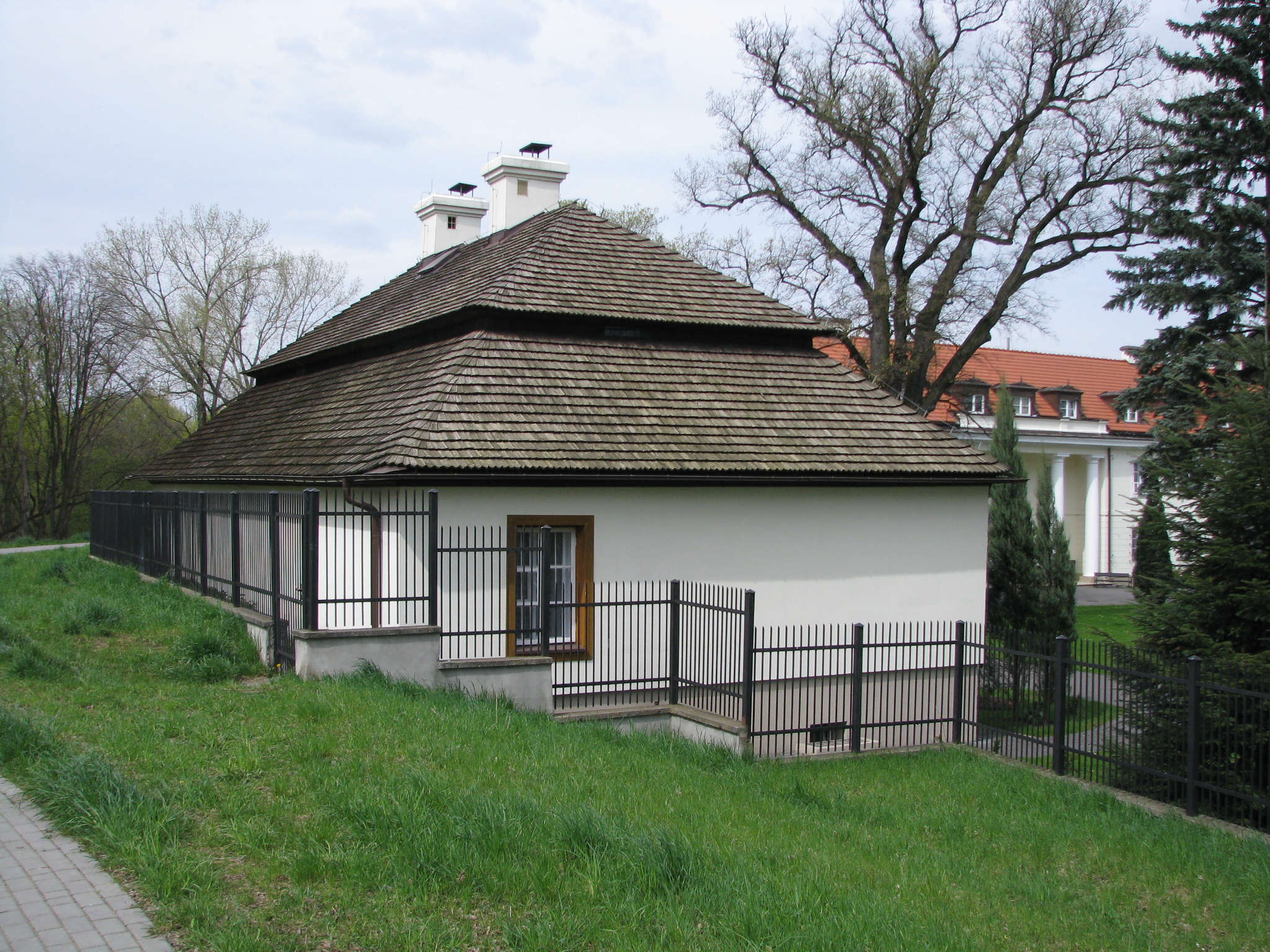 Pałac Mostowskich w Tarchominie, XVIII-wieczny dwór w zespole pałacowo-parkowym przy ul Mehoffera w Warszawie, widok od strony wału wiślanego, w tle po prawej Pałac Mostowskich.